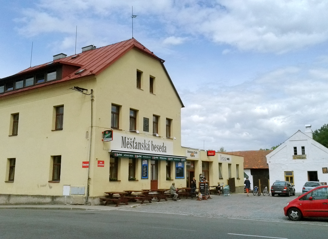 Zde se narodil profesor Čeněk Strouhal. Adresa je: náměstí profesora Čeňka Strouhala 56, 538 07 Seč Kromě pamětní desky nad vchodem do domu tam snad žádný odkaz na tohoto člověka není. Za socialismu v něm bylo pár bytů a sídlila v něm výrobna Dřevotvaru, teď je tam restaurace.